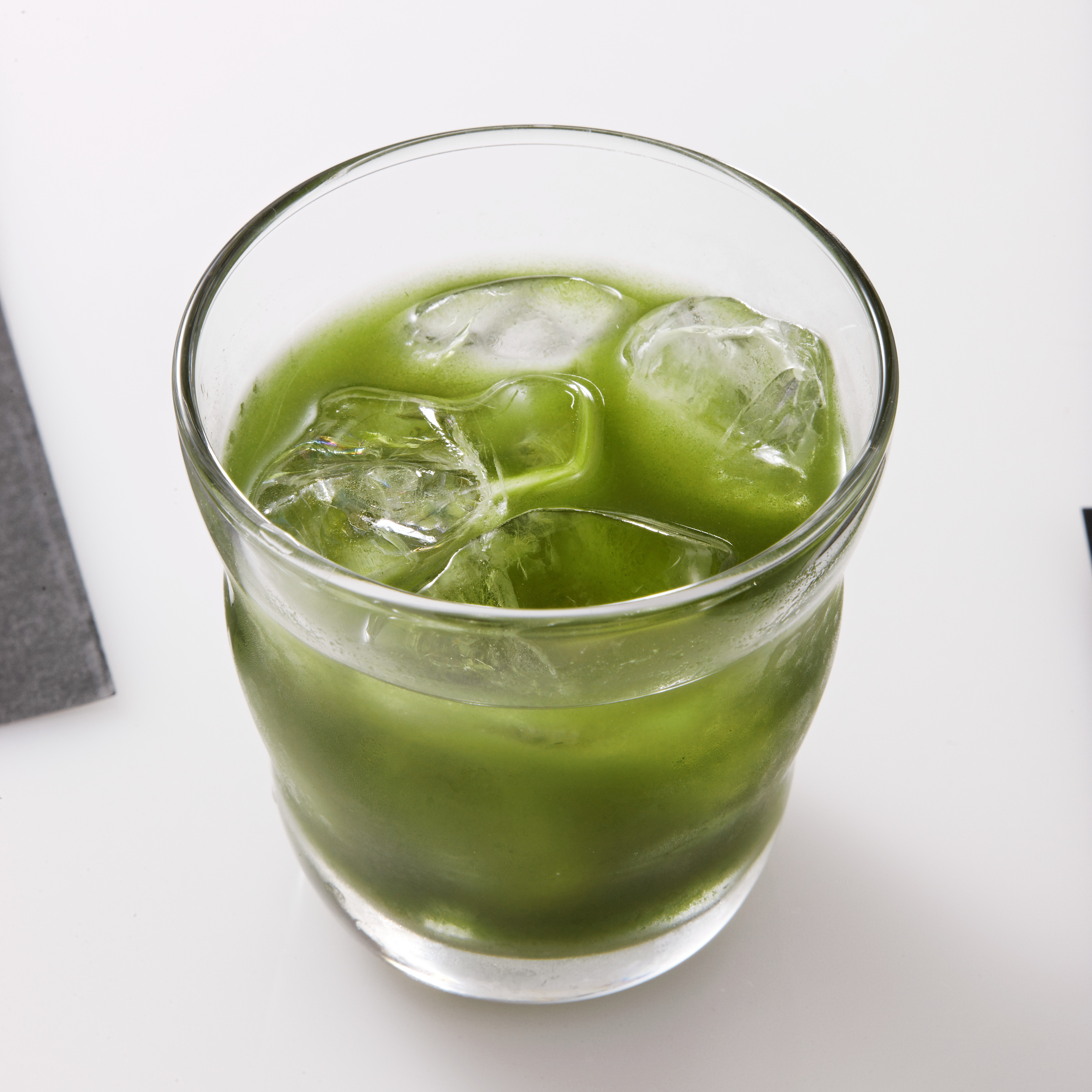 やまだの青汁を水やお湯、焼酎で割ったえみ割り